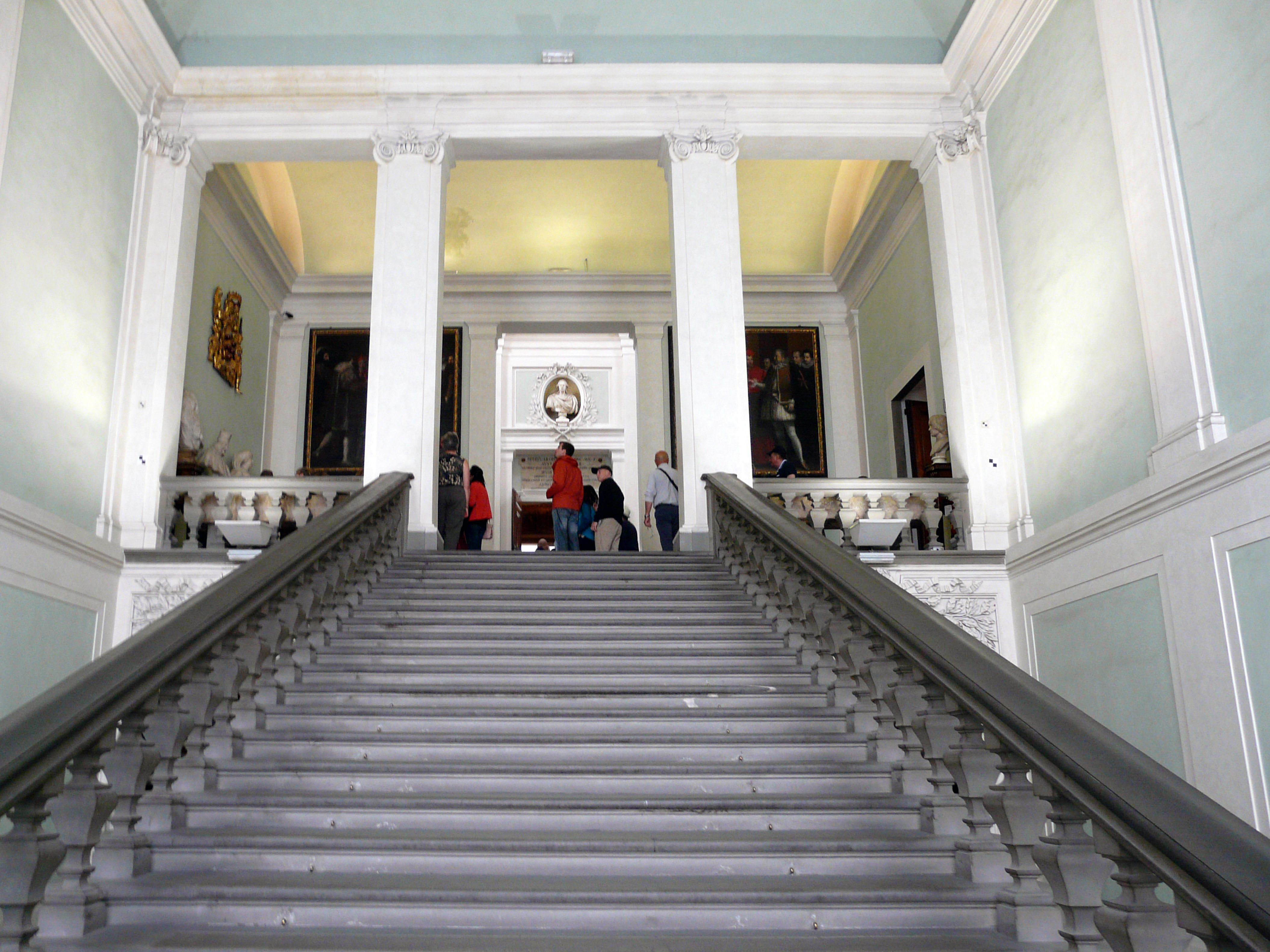 Центральная лестница Галереи, Флоренция